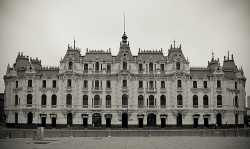 Fachada del Edificio Rímac